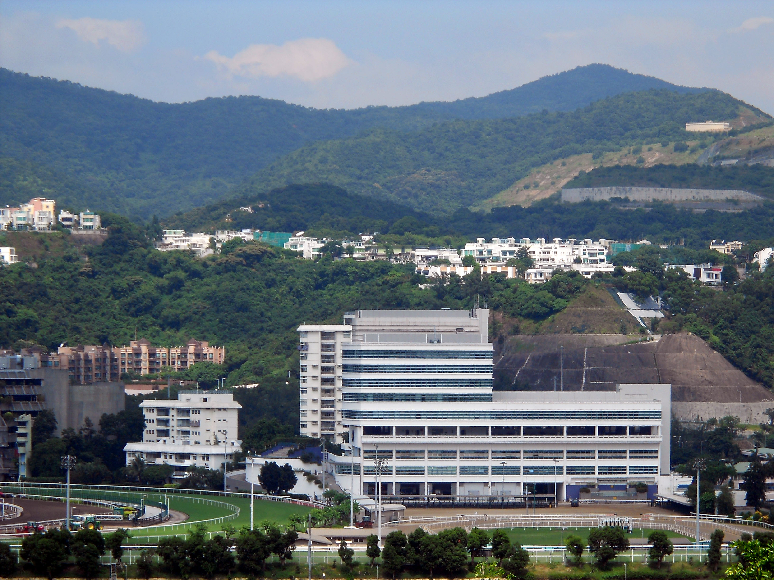 中文（香港）: 九肚山山腰的豪宅